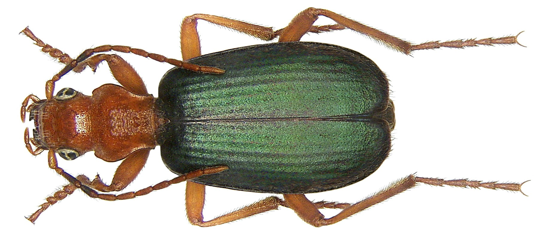 Familie: Carabidae Größe: 6,0-10,5 mm Verbreitung: Europa, Westasien Ökologie: auf lehmigem und kalkigem, sonnenexponiertem Untergrund Fundort: Germania, Unterfranken, Schweinfurth, Sulzthal leg.det. U.Schmidt, 1980 Foto: U.Schmidt, 2008